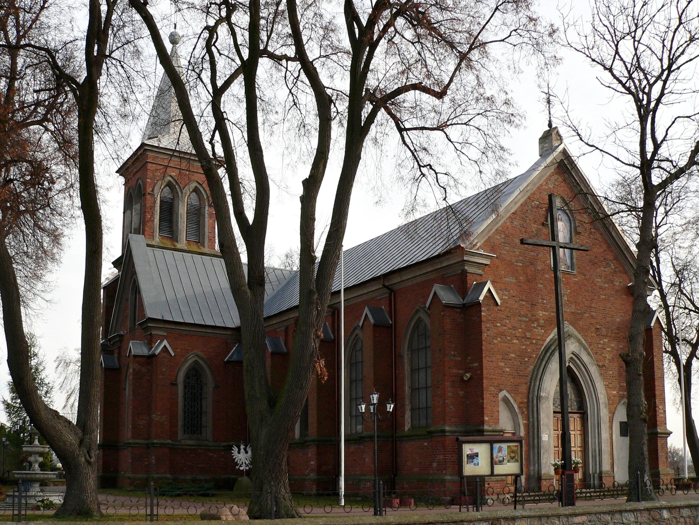 Stara Biała - kościół parafialny p.w. św. Jadwigi Śląskiej (zabytek nr 440)